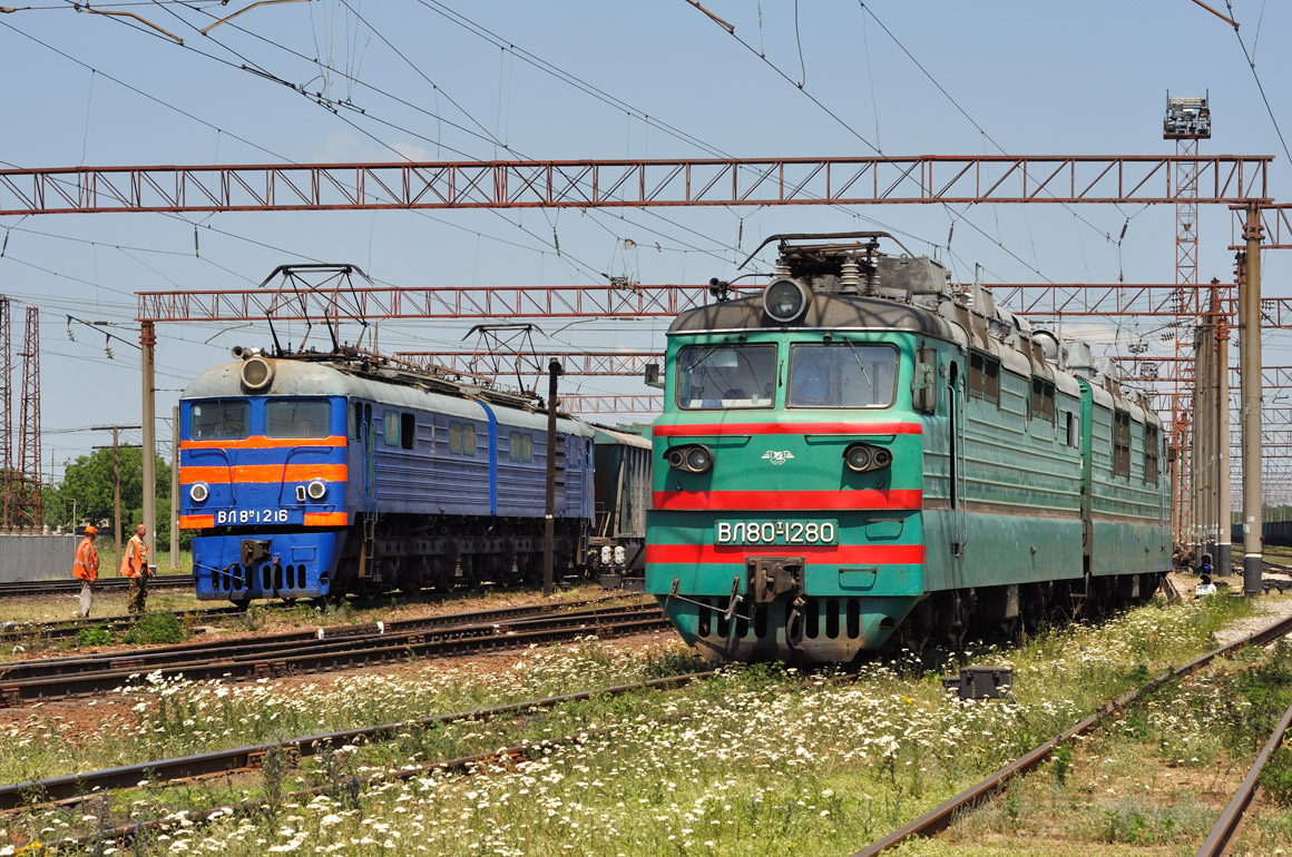 Электровоз постоянного тока ВЛ8М-1216 и электровоз переменного тока ВЛ80Т-1280, ст. Тимково ОДС ЖД